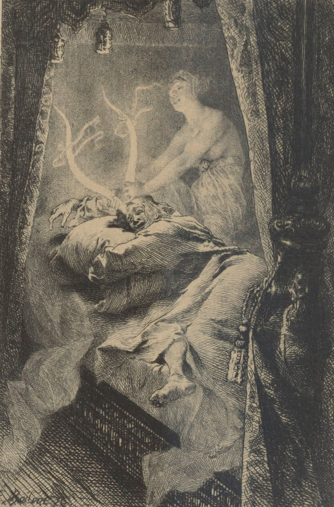 Tiré du Tiers Livre, tome 3 des Cinq livres de F. Rabelais, publiés avec des variantes et un glossaire par P. Chéron ; et ornés de onze eaux-fortes par E. Boilvin. Éditeur Librairie des bibliophiles. Édité en 1876-1877